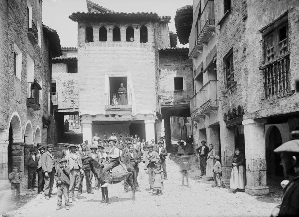 Imatge